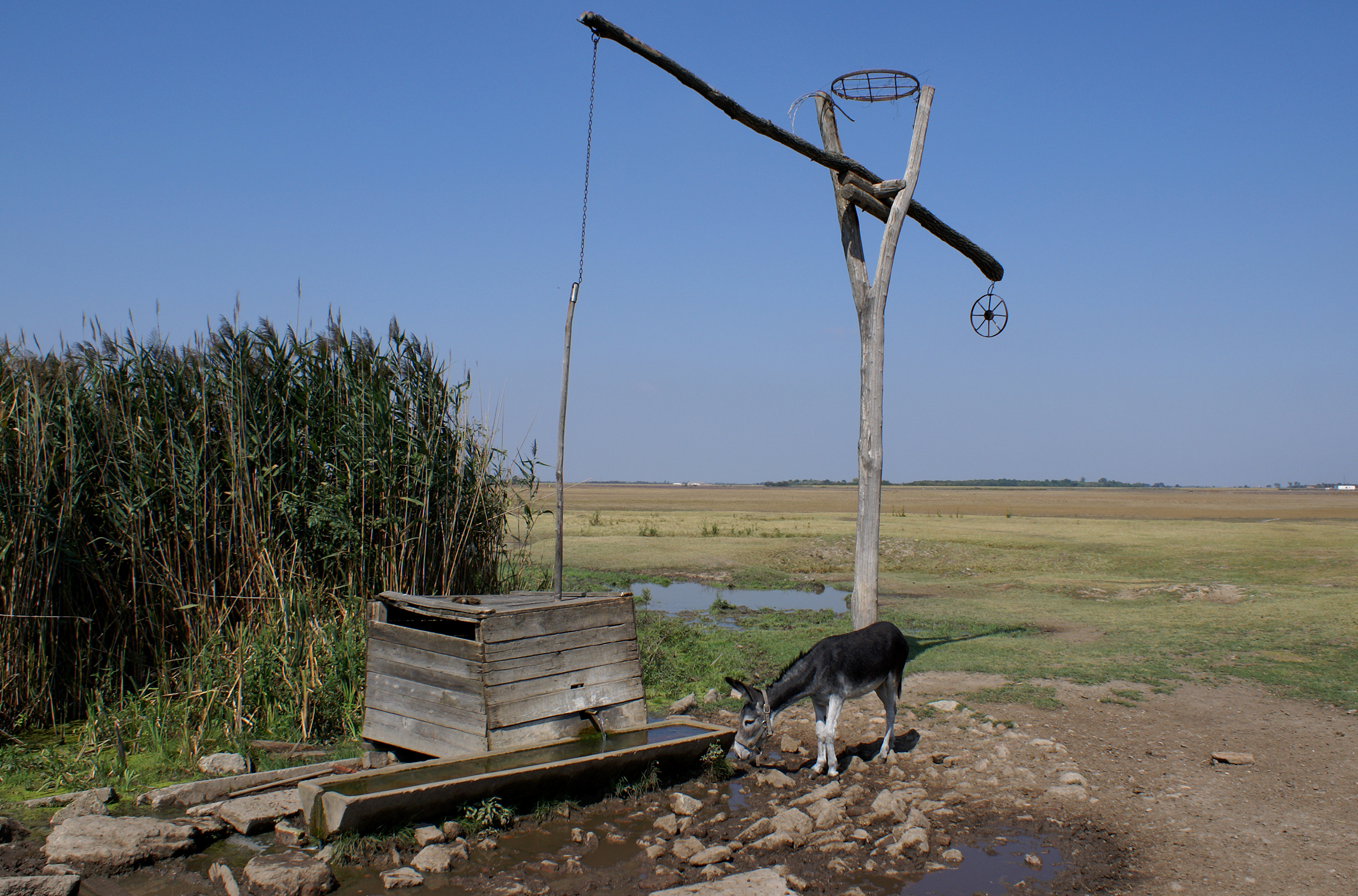 Gémeskút a Gyula környéki pusztán